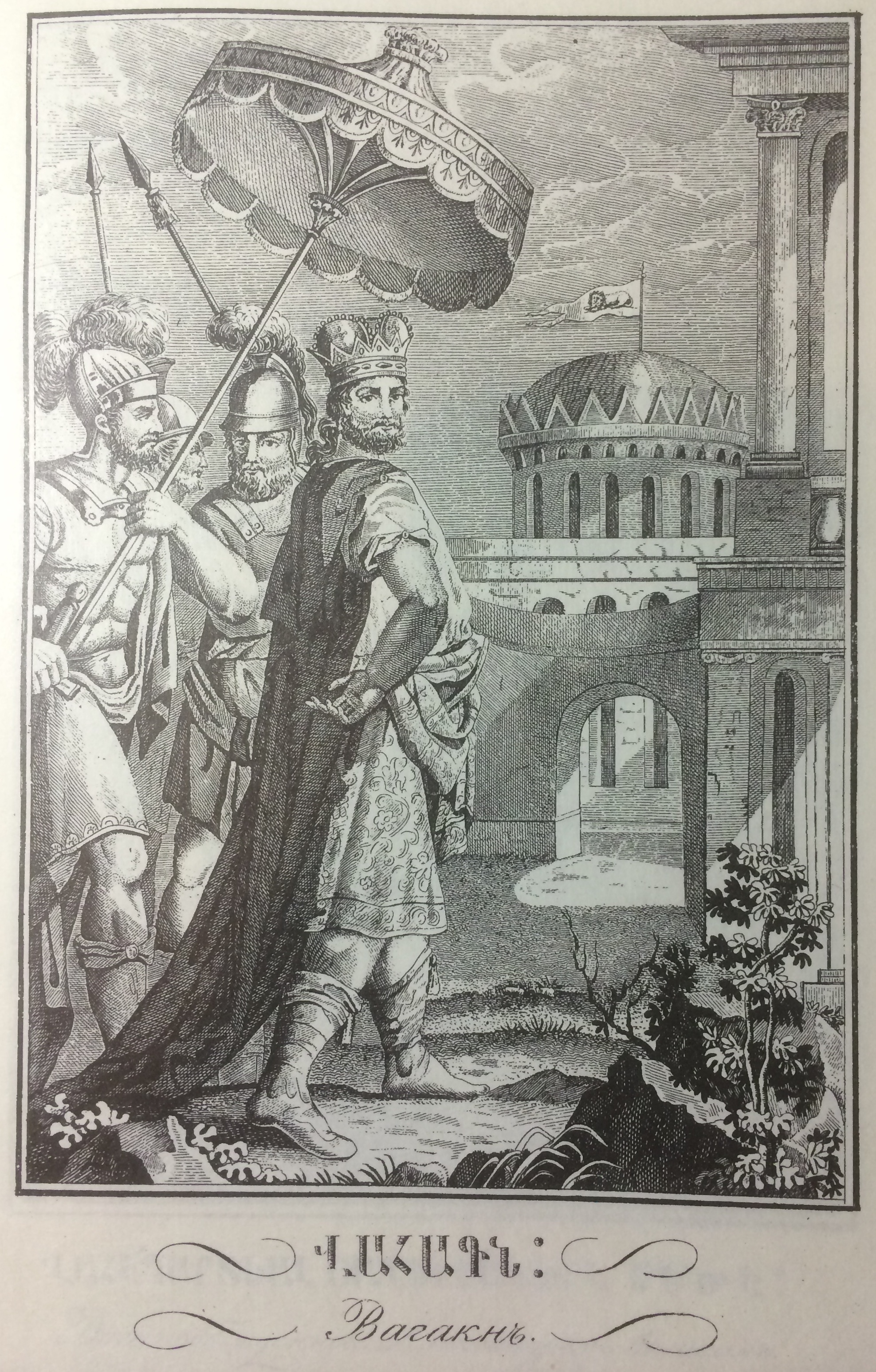 Վահագն թագավորը